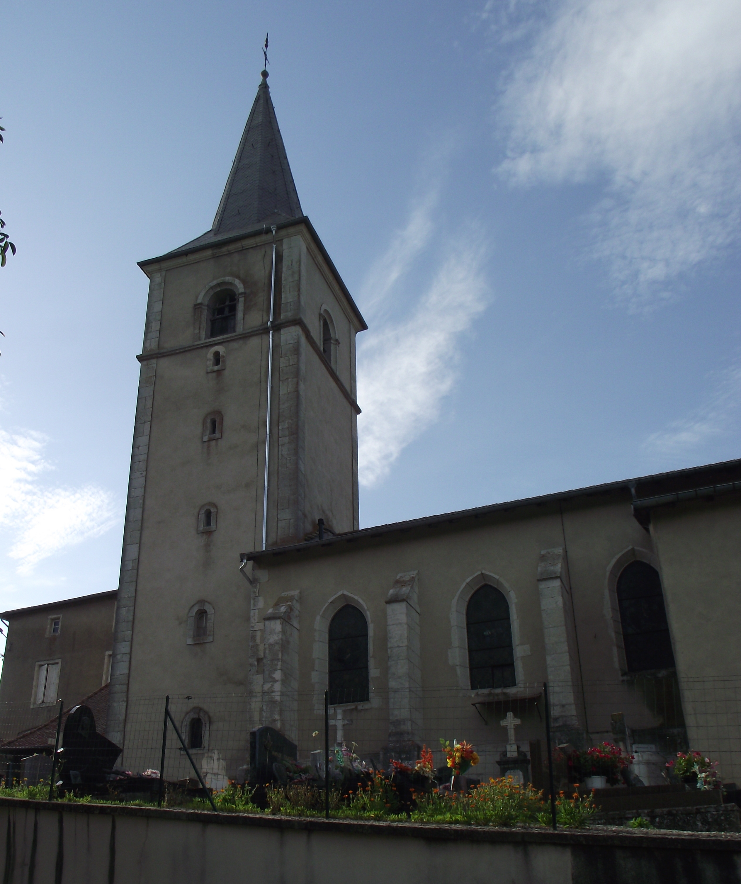 Église de Houdreville vue du coté droit